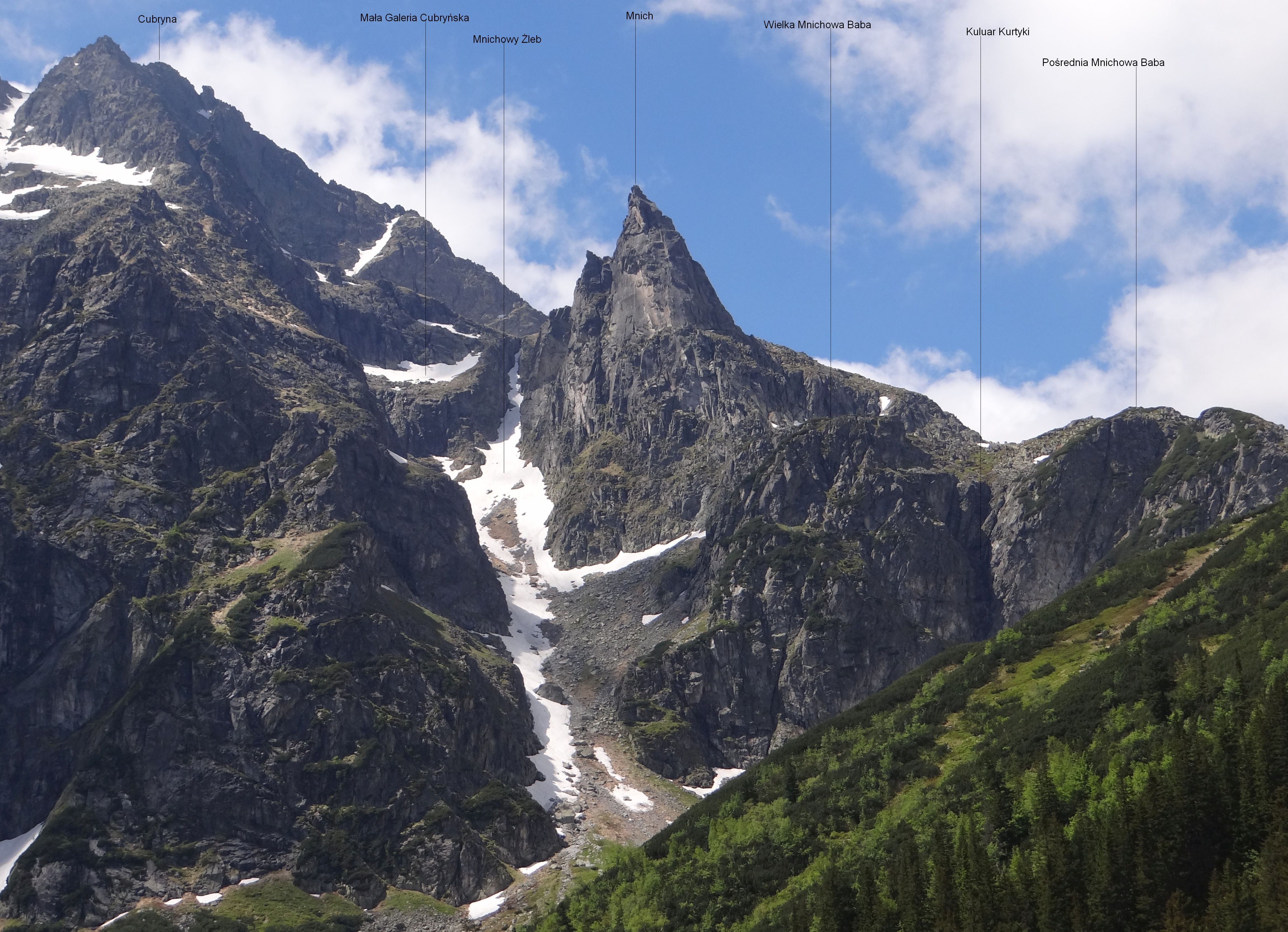 Widok znad Morskiego Oka